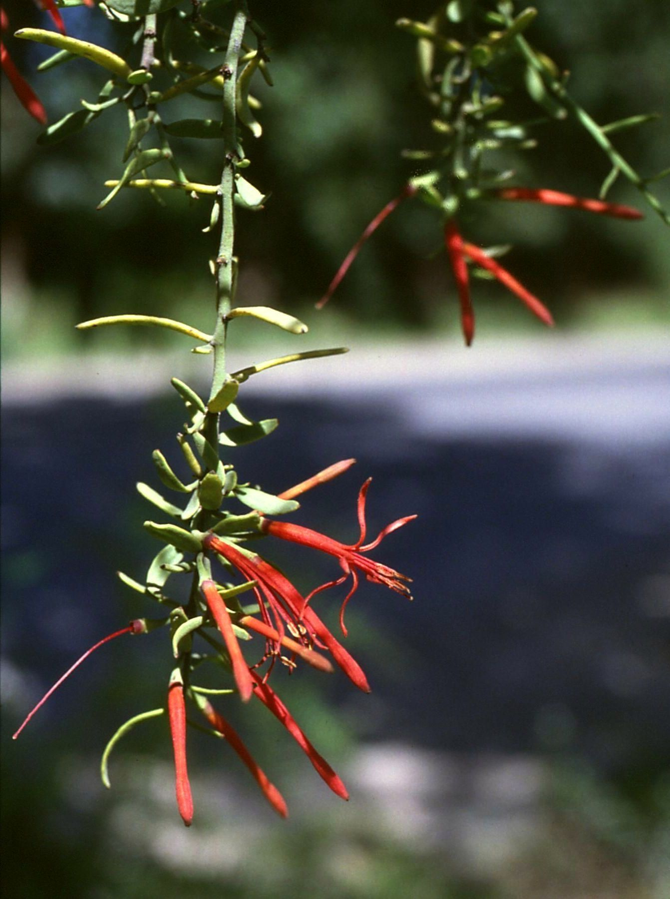 Ligaria cuneifolia, Riemenblumengewächse (Loranthaceae), parasitisch auf/parasitando a/parasitic on Schinus molle - Argentinien/Argentina, Mendoza, Parque General San Martín (Prov. Mendoza)